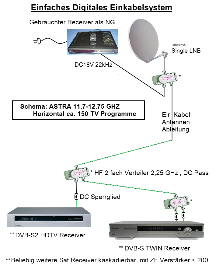 ASTRA-EASY-SAT AT